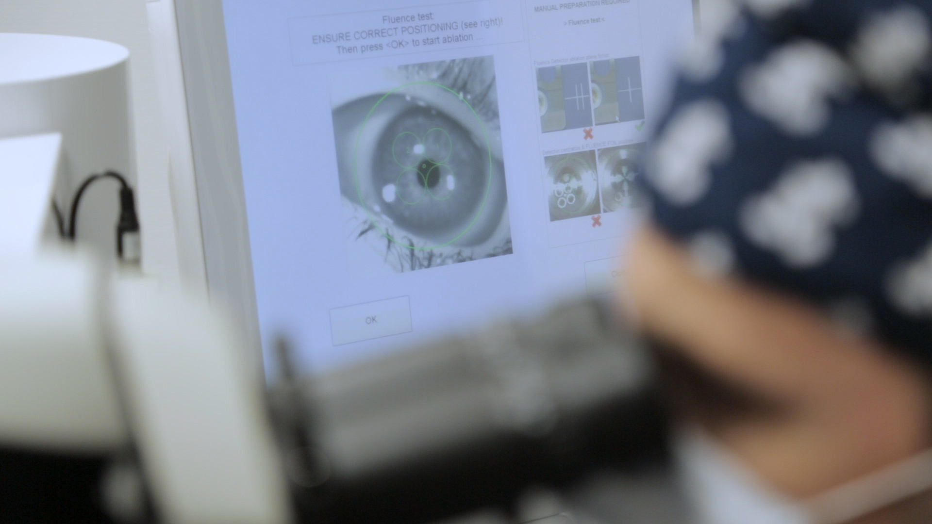 Monitor kép a szem pozicionálásáról lézeres szemműtét előtt a Schwind Amaris 1050RS excimer lézerhez. A fájl által ábrázolt elemek: Schwind Amaris 1050RS excimer lézerhez tartozó monitor, melyet az operatőr használ a lézeres látásjavítás során. Helyszín: Budai Szemészeti Központ, 1126 Budapest, Tartsay Vilmos utca 14.